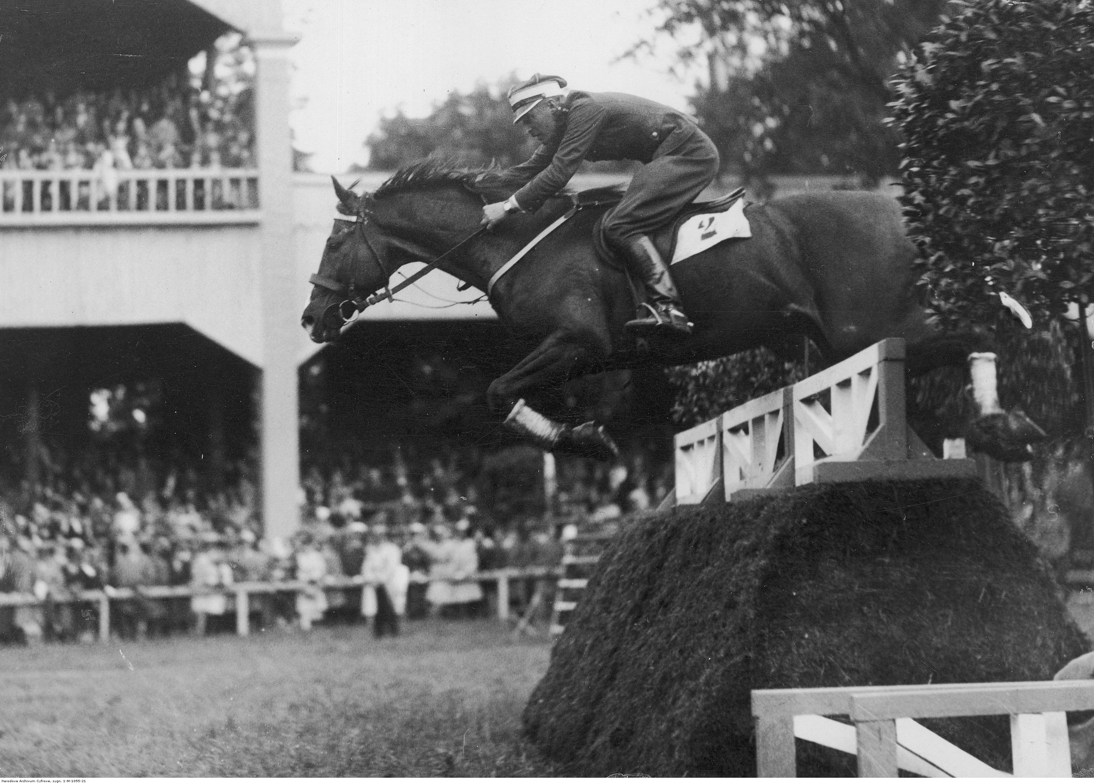 Rotmistrz Kazimierz Szosland w skoku przez przeszkodę podczas Międzynarodowych Zawodów Hippicznych na hipodromie w Łazienkach Królewskich w Warszawie w 1933 roku